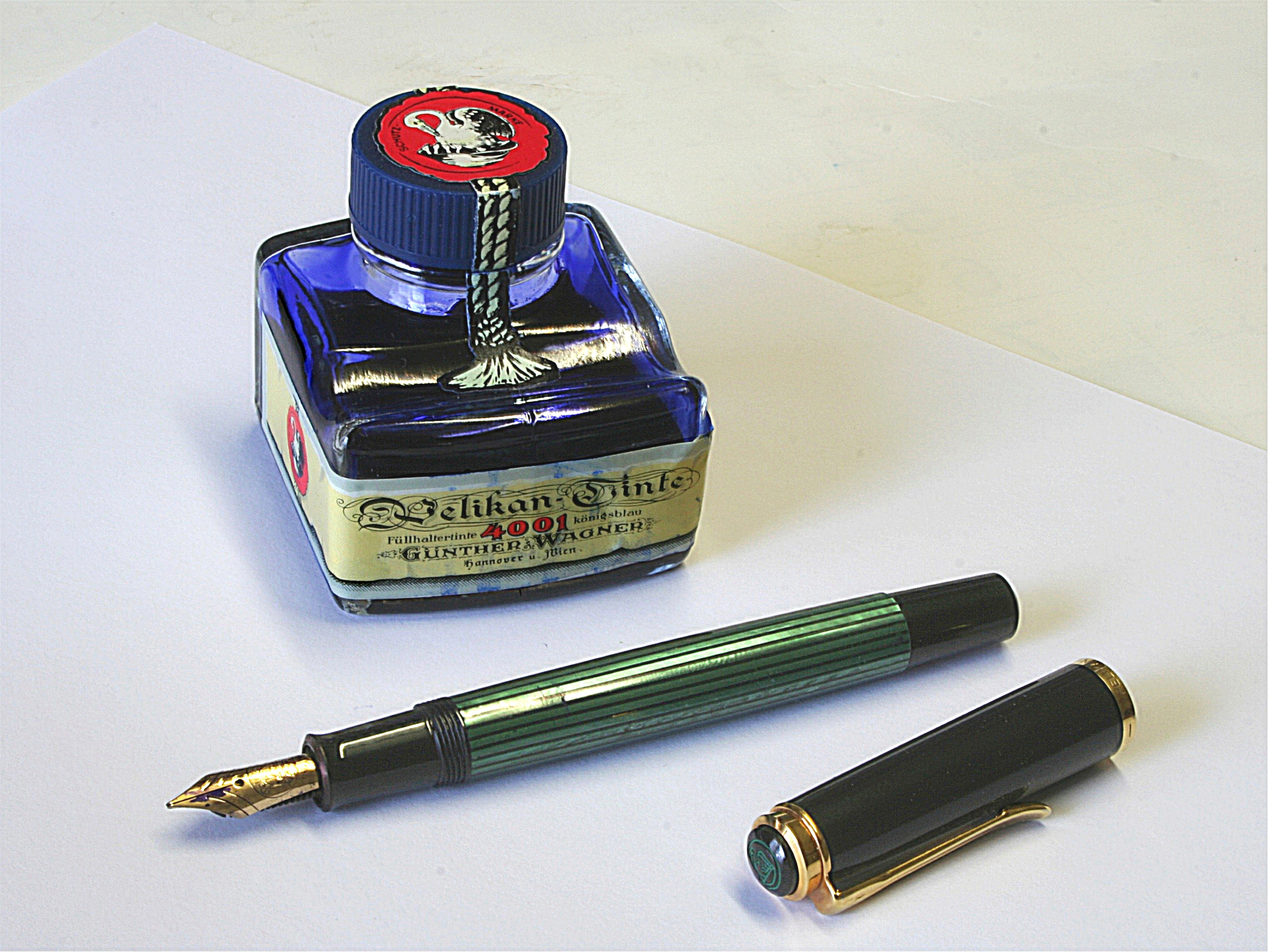 Klassischer Pelikan-Kolbenfüllfederhalter (hergestellt 1989) und Tintenglas.